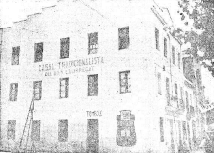 Casal Tradicionalista del Baix Llobregat al carrer Ignasi Iglésies (de la Mercè), núm. 24, Sant Feliu de Llobregat